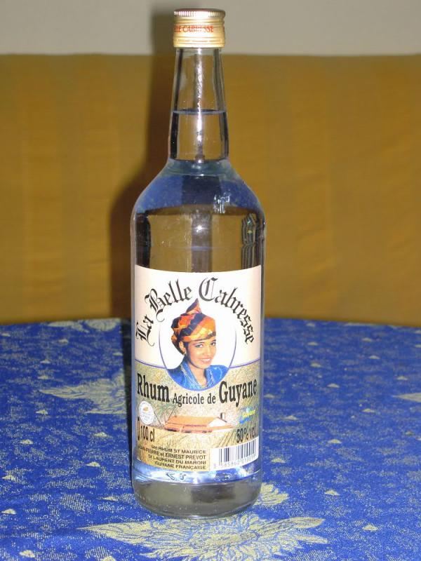 Bouteille de Belle Cabresse, rhum produit en Guyane française.